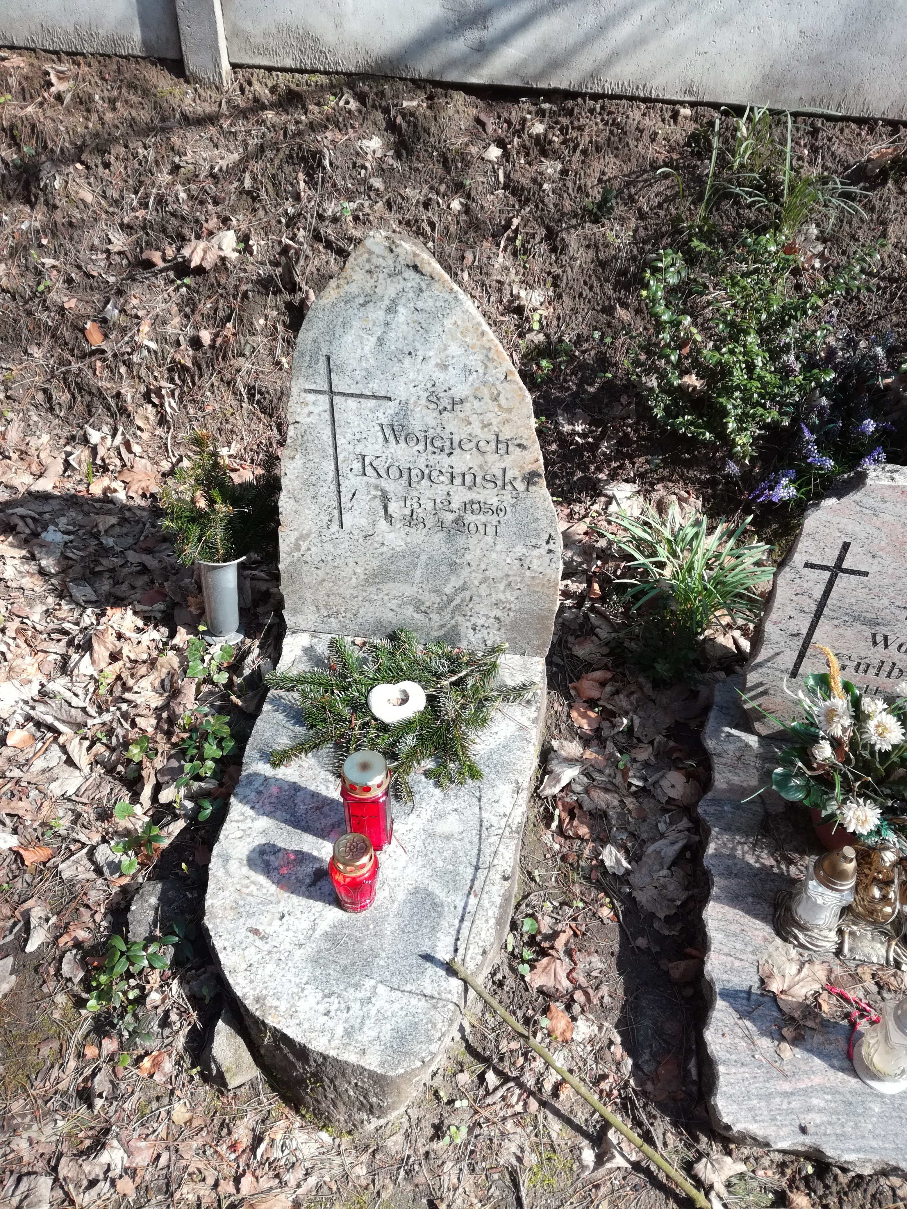 Grób reżysera teatralnego, pisarza i scenarzysty Wojciecha Kopcińskiego (1950-2011) na cmentarzu Srebrzysko w Gdańsku.